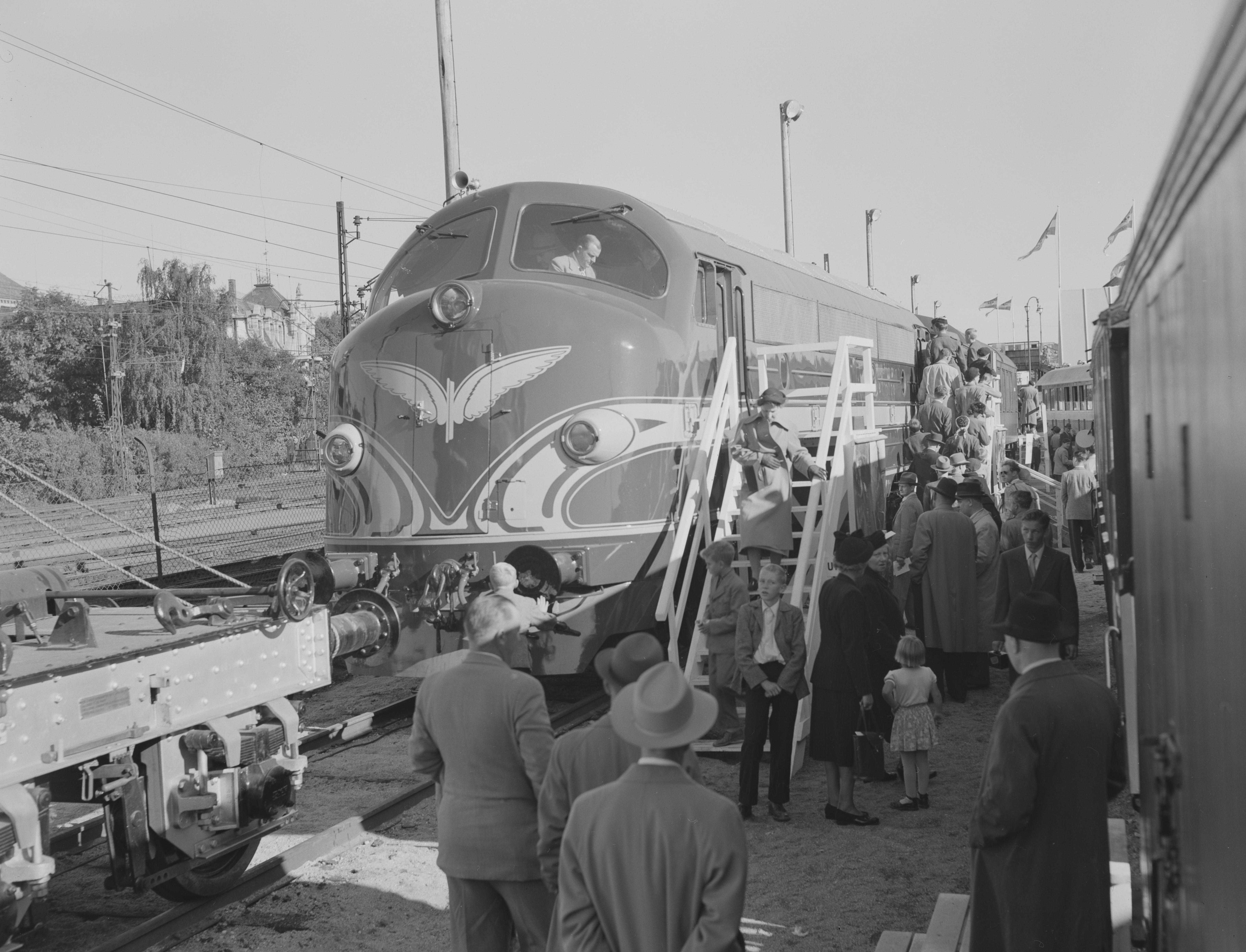 Bildet er hentet fra Nasjonalbibliotekets bildesamling. Anmerkninger til bildet var: Fotograf : ukjent Oslo, Oslo, Oslo